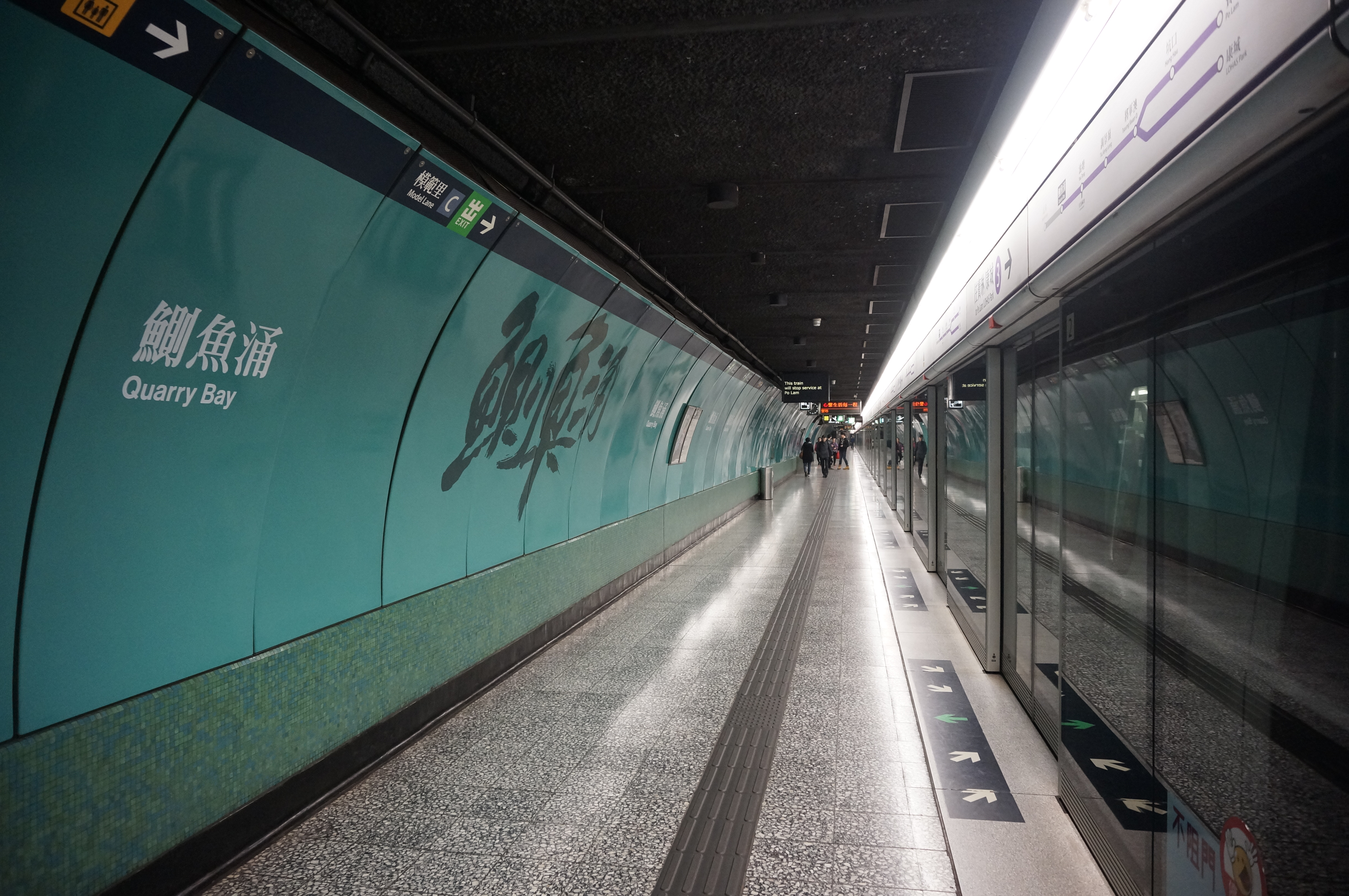 港鐵鰂魚涌站月台